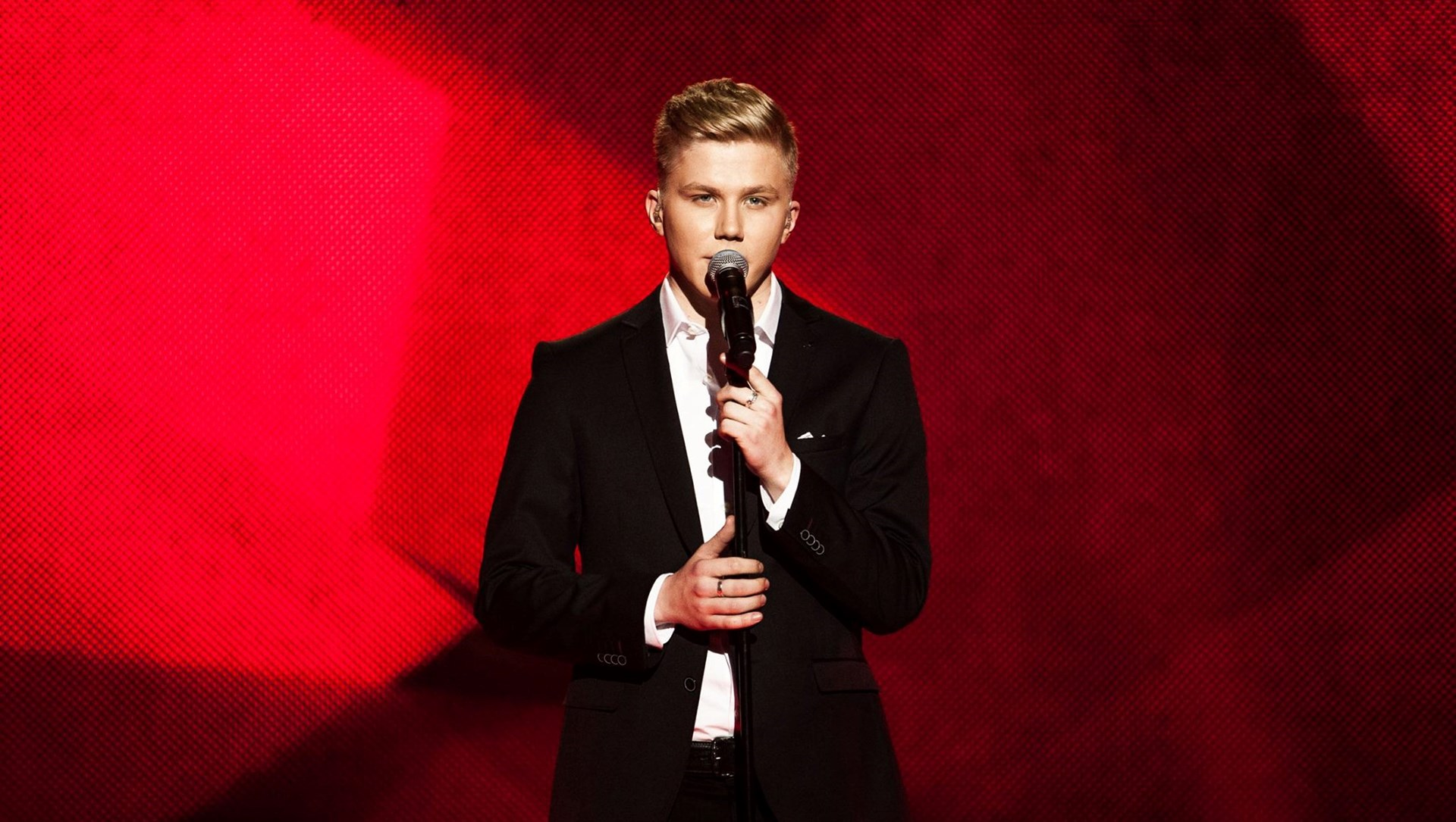 Foto: TV3